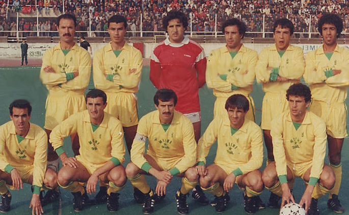 Image de l'équipe de la Jeunesse sportive Kabylie; sous le nom de la Jeunesse Electronique de Tizi-Ouzou en 1986 De Gauche à Droite : Debout : Larbes - Adghigh - Amara - Heffaf - Sadmi - Belahcène Assis : Bahbouh - Menad - Fergani - Abdeslam - Bouiche